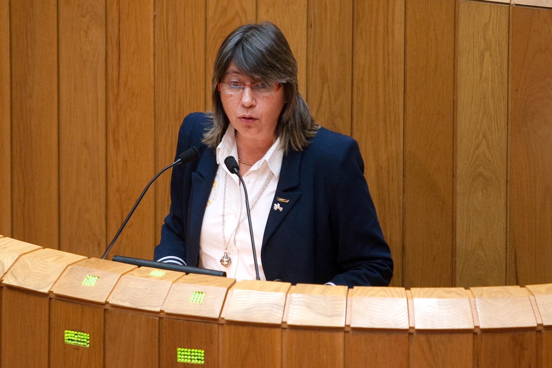 A conselleira do Mar, Rosa Quintana, comparecerá no Parlamento para explicar a aplicación do Plan Nacional de Salvamento Marítimo. foto xoán crespo 24/11/10